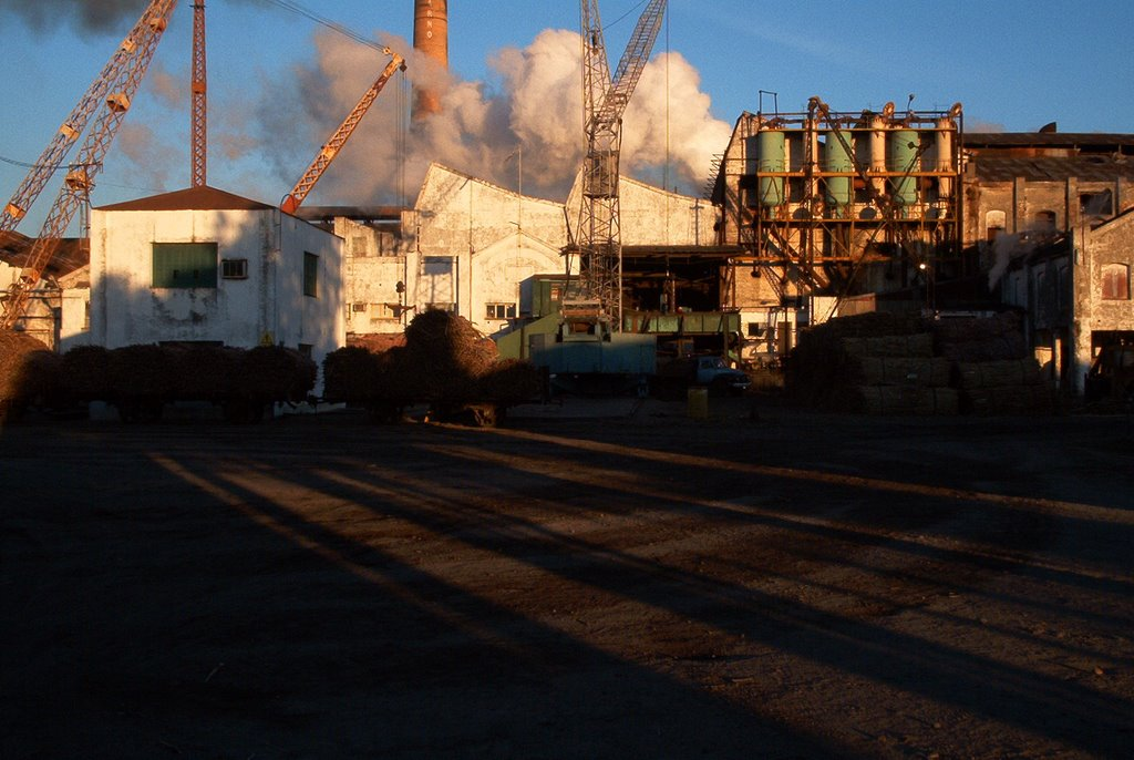 Ingenio Arno (Villa Ocampo, Santa Fe, Argentina) en época de zafra.